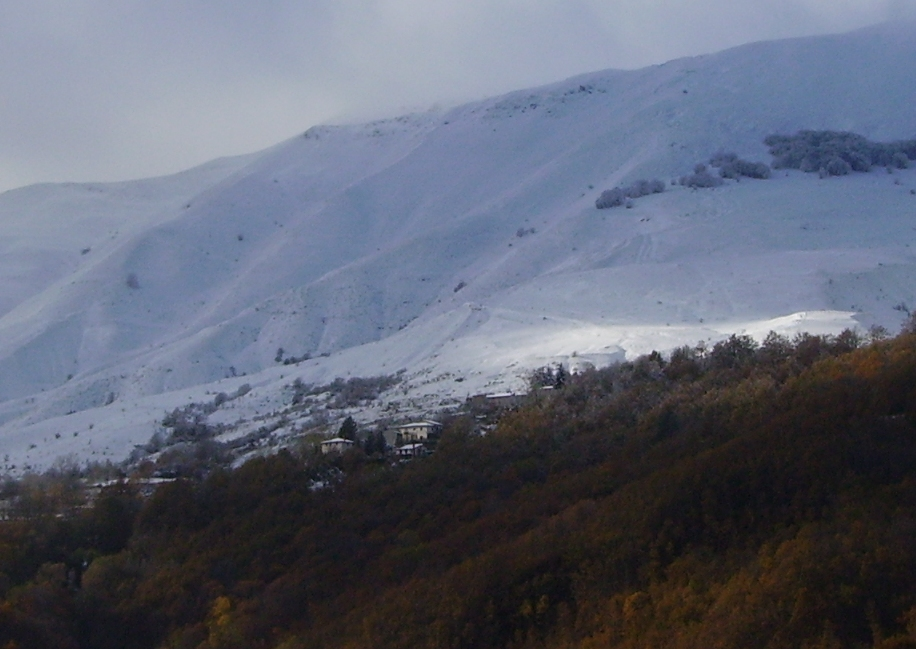 foto panoramica su Aleggia e la sua valle